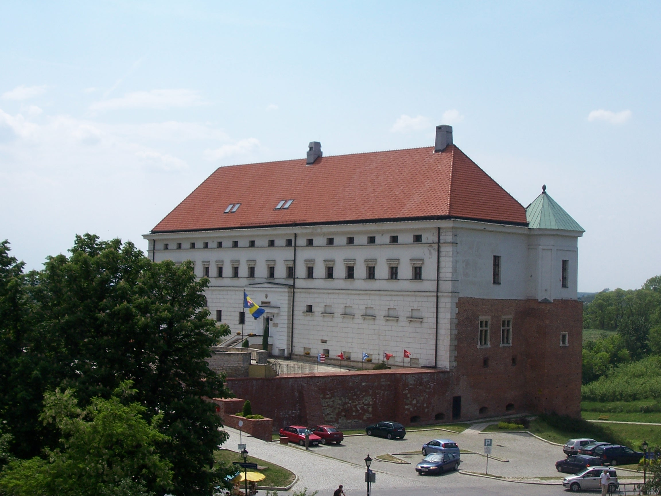 Sandomierz, ul. Zamkowa 12 - zamek królewski, obecnie muzeum okręgowe